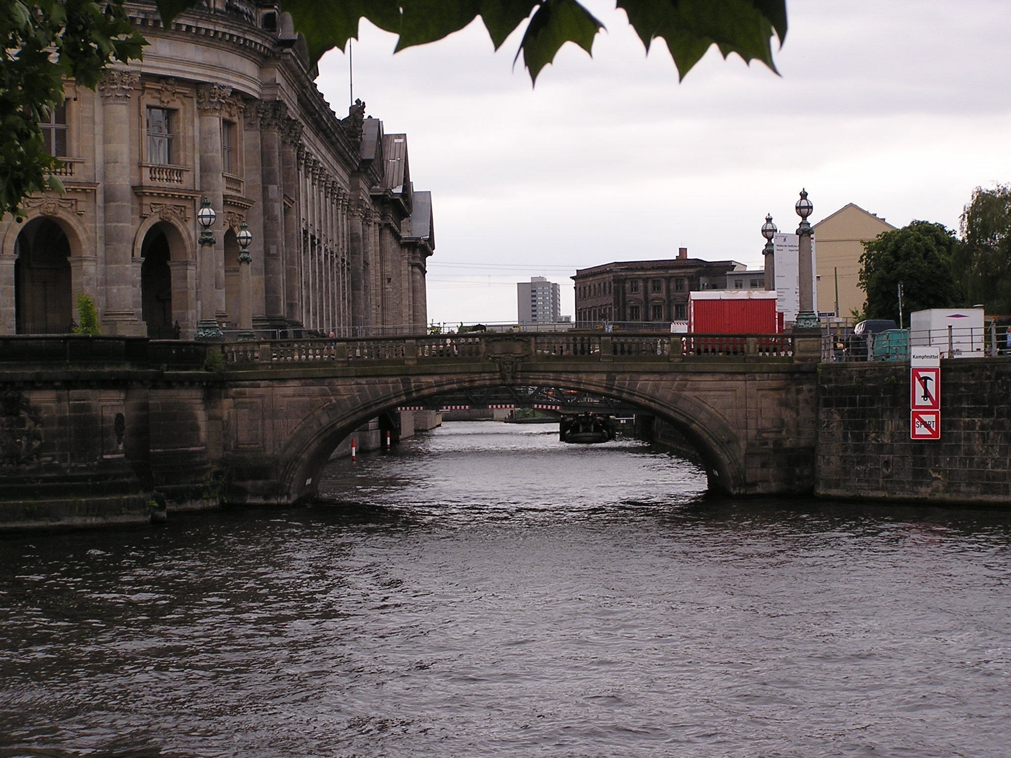 Monbijoubrücke über den Kupfergraben in Berlin